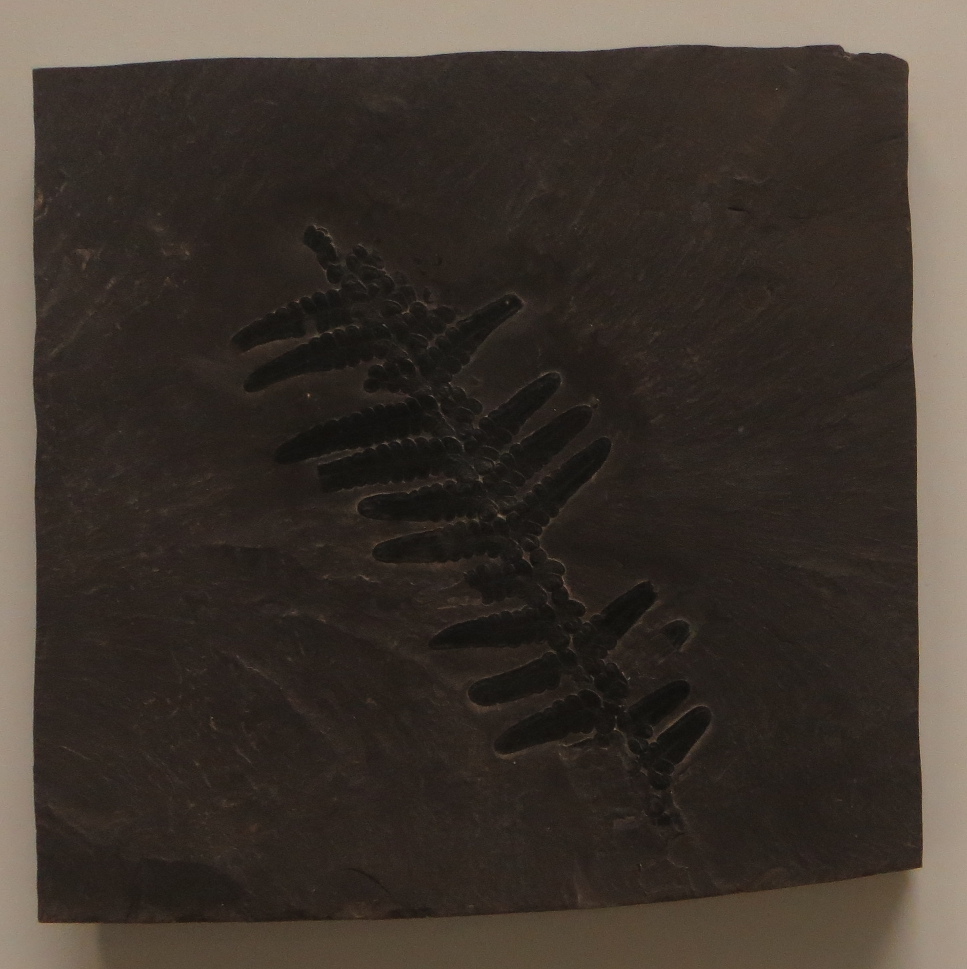 Fossil of Pachypteris - Took the picture at Museum am Lowentor, Stuttgart